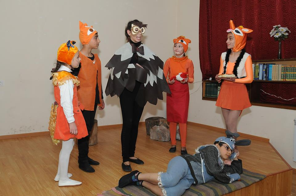 Հ.32 գրադարանում հաճախ կազմակերպվում են թատերական ներկայացումներ